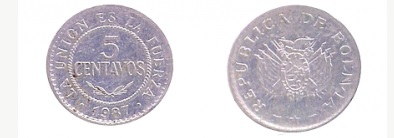 Moneda c5